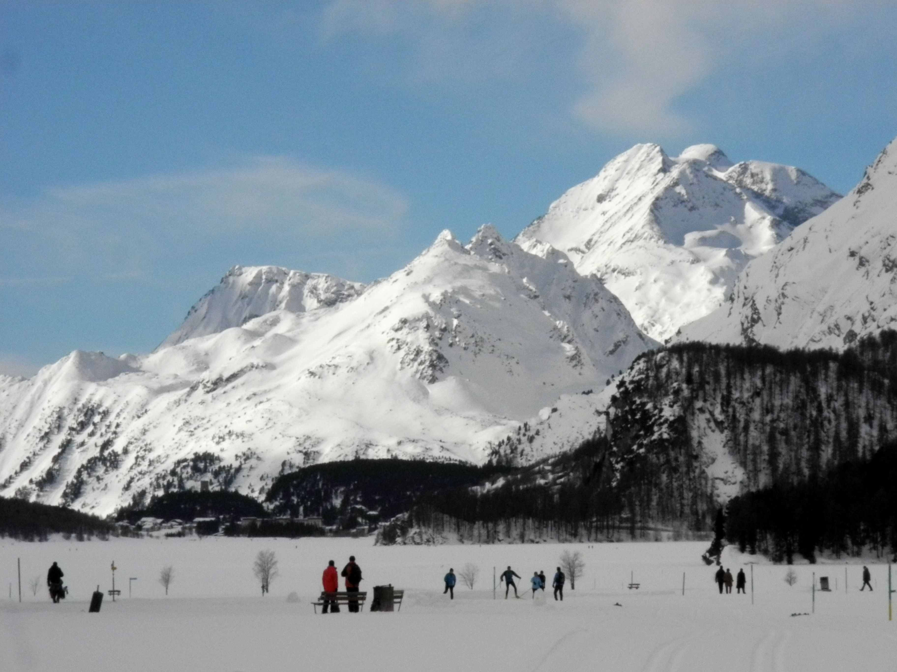 Sils-Loipe auf dem See,Bergeller Berge